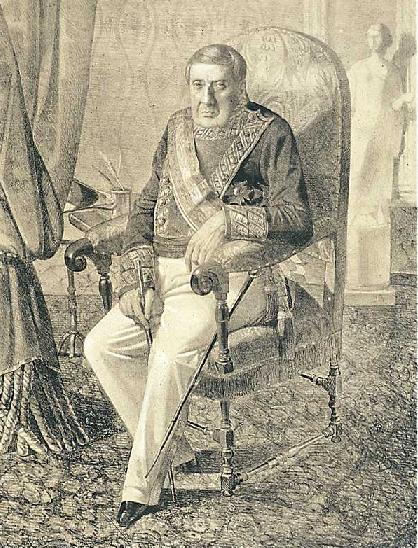 Retrato de Juan Ramirez Orozco (1764-1852), general en jefe del Ejército Realista del Alto Perú